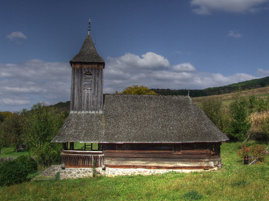 Biserica de lemn din Nădaşa, judeţul Mureş. Vedere din sud.